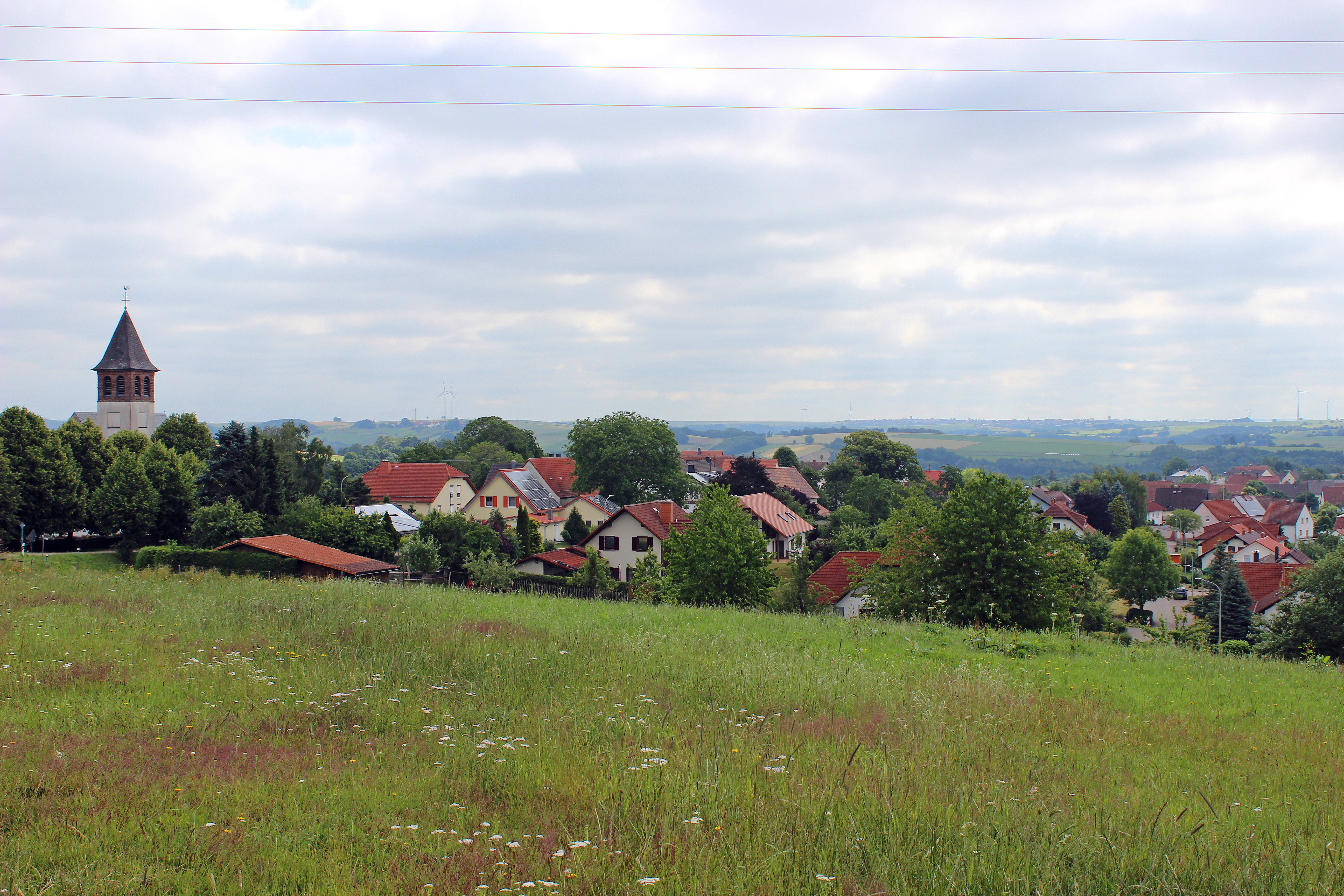 Ansicht von Knopp, einem Ortsteil der Gemeinde Knopp-Labach, Verbandsgemeinde Thaleischweiler-Fröschen - Wallhalben, Landkreis Südwestpfalz, Rheinland-Pfalz